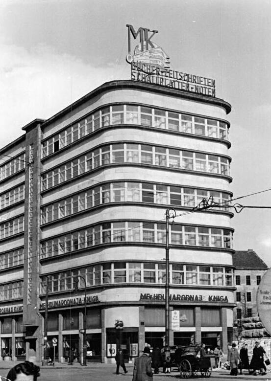 Berlin, Alexanderplatz, "Haus der Meshdunarodnaja Kniga" Ilus-Schmidtke 13.4.1951 Berlin 1951 UBz: Haus der Meshdunarodnaja Kniga (Das internationale Buch) am Alexanderplatz.